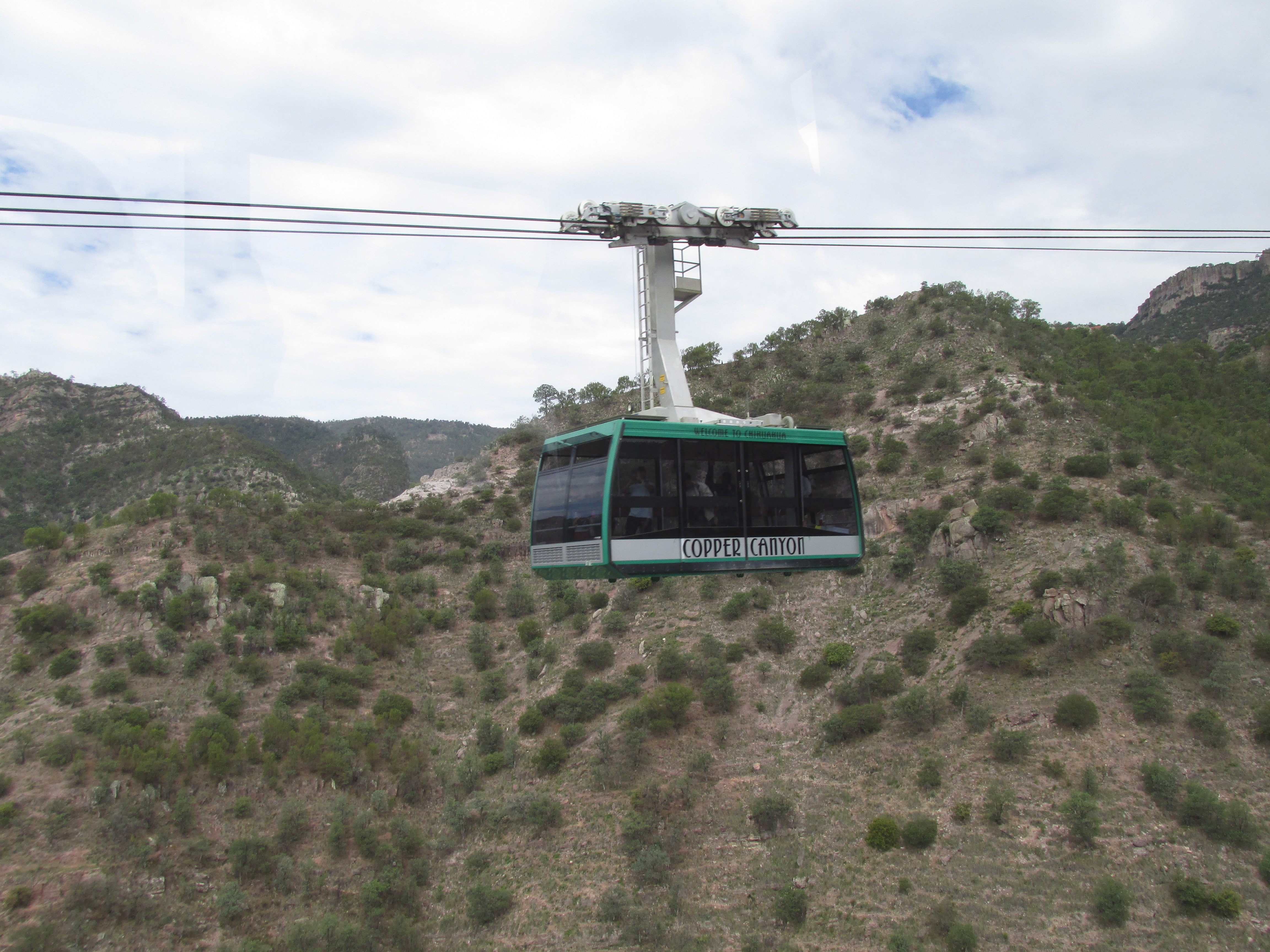 Teleférico en las Barrancas del Cobre, Chihuahua.